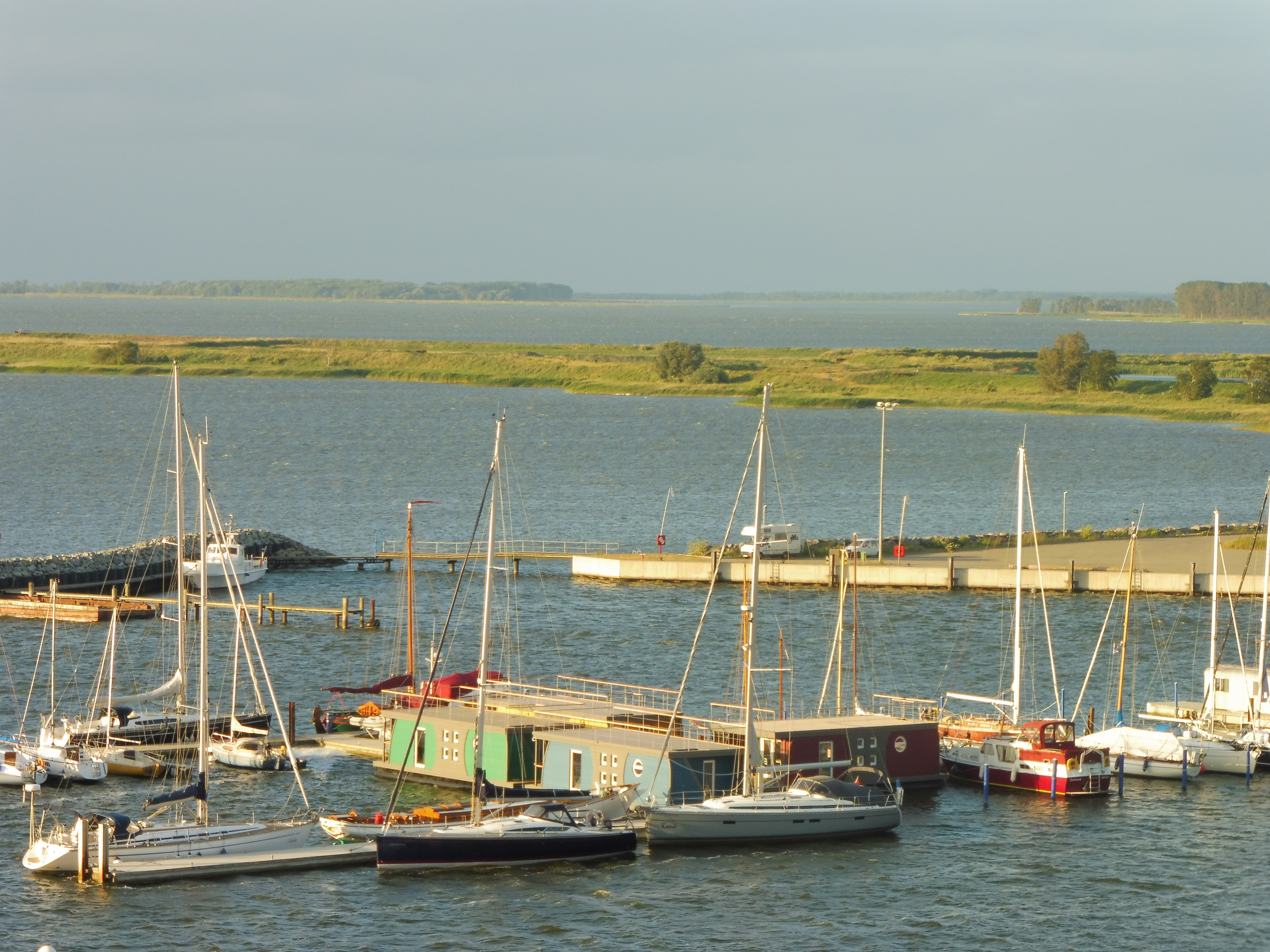 Östlicher Hafenteil mit Yachten in Barth, Barther Bodden